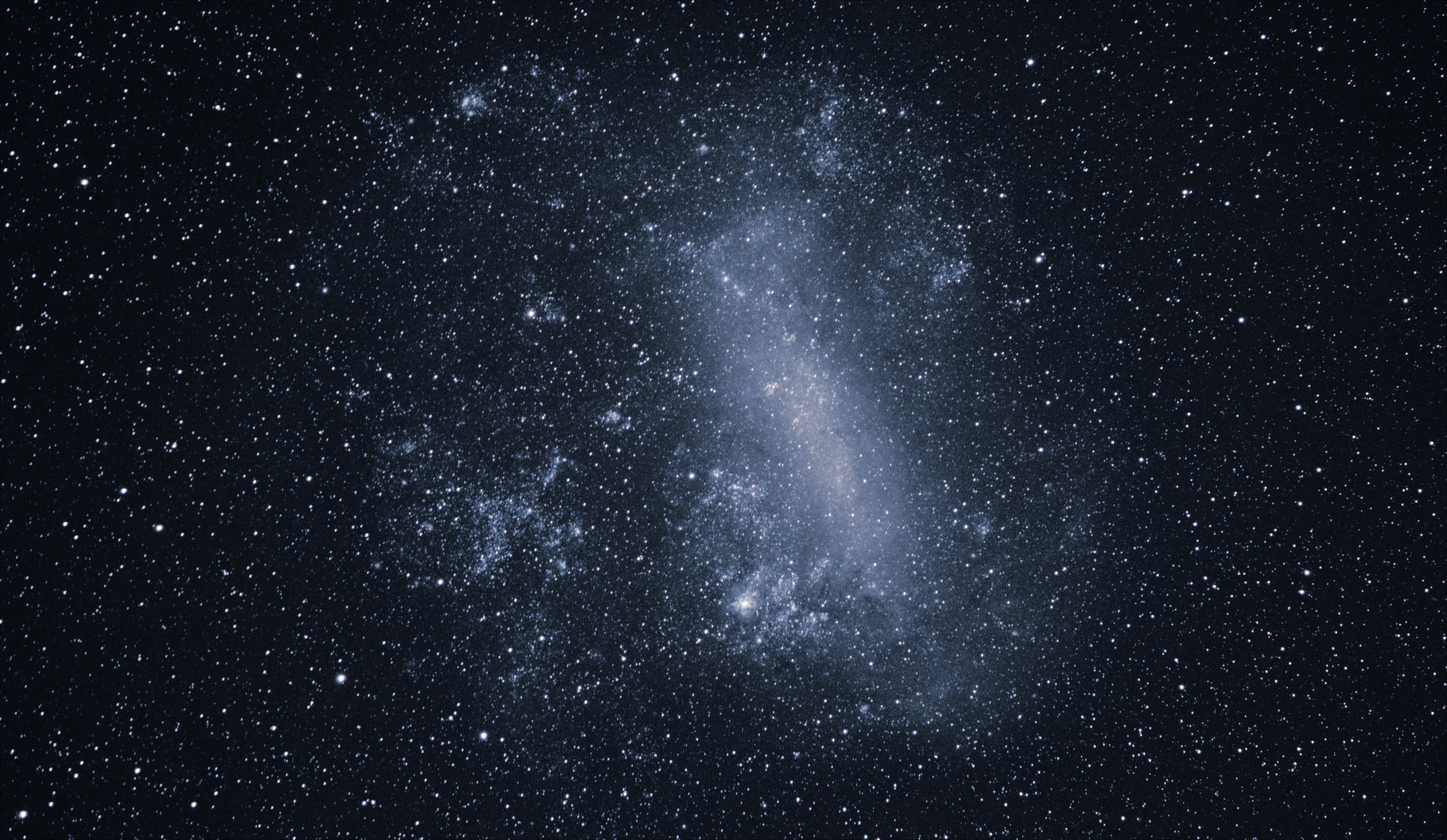 Registro feito em San Pedro de Atacama, Chile